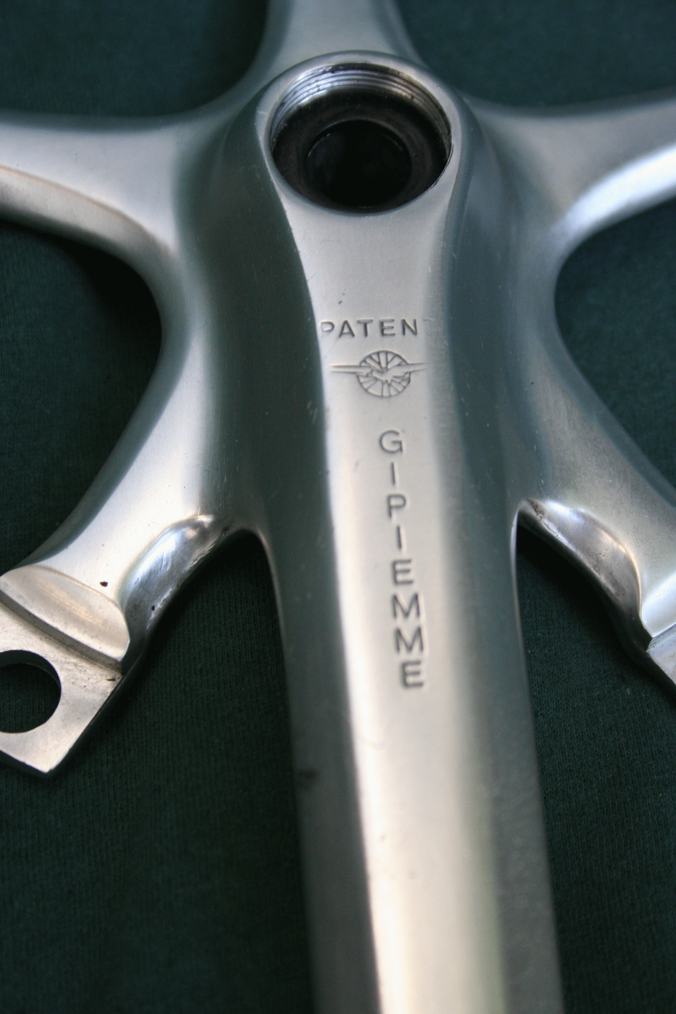 GPM Rennradkurbel mit Kettenblattaufnahmen, mittig Öffnung für Sechskant Kettenblattschraube